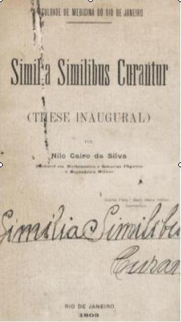 Tese de graduação do dr. Nilo Cairo